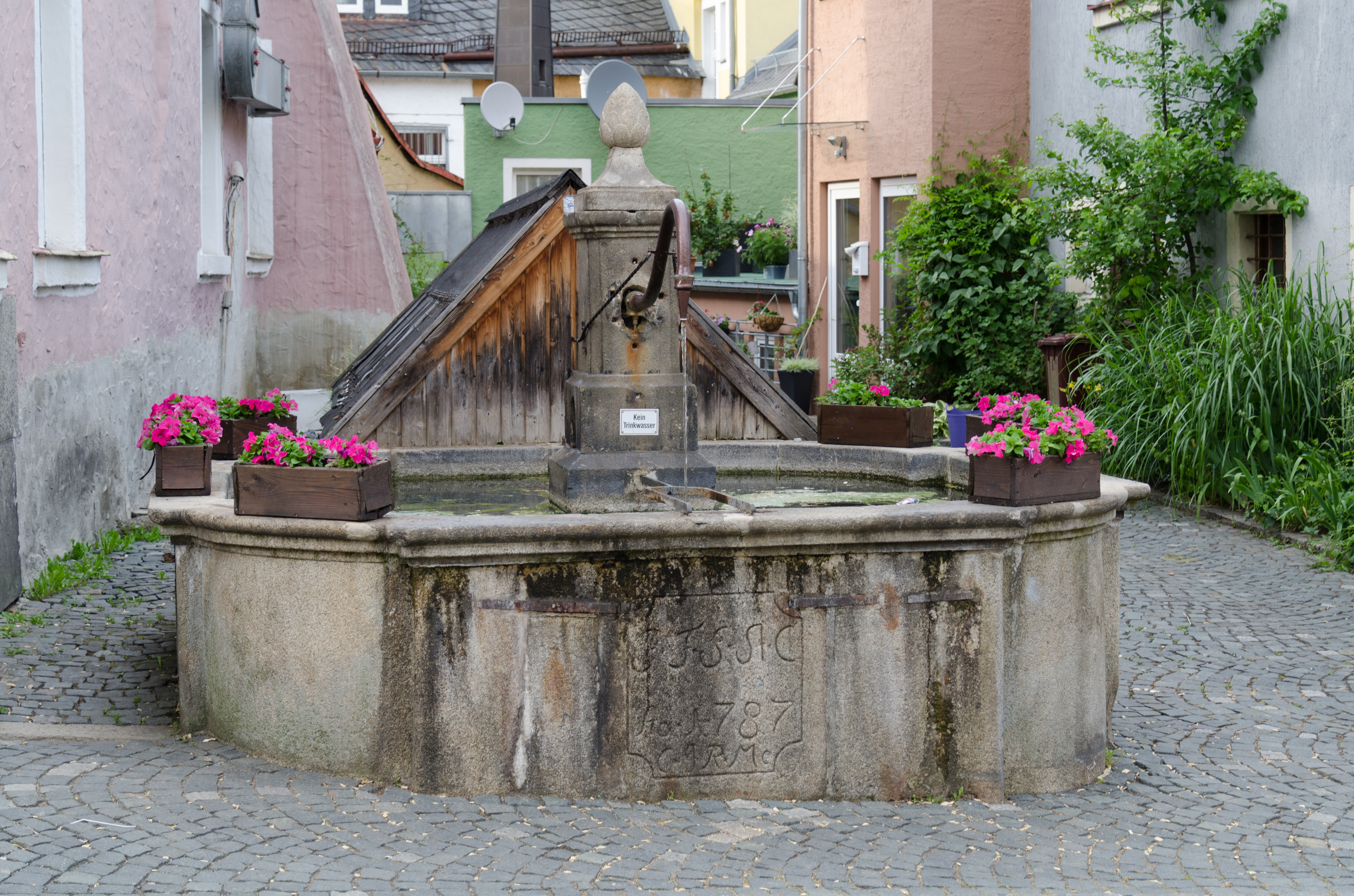 Wunsiedel, Koppetentorstraße 13, Brunnen